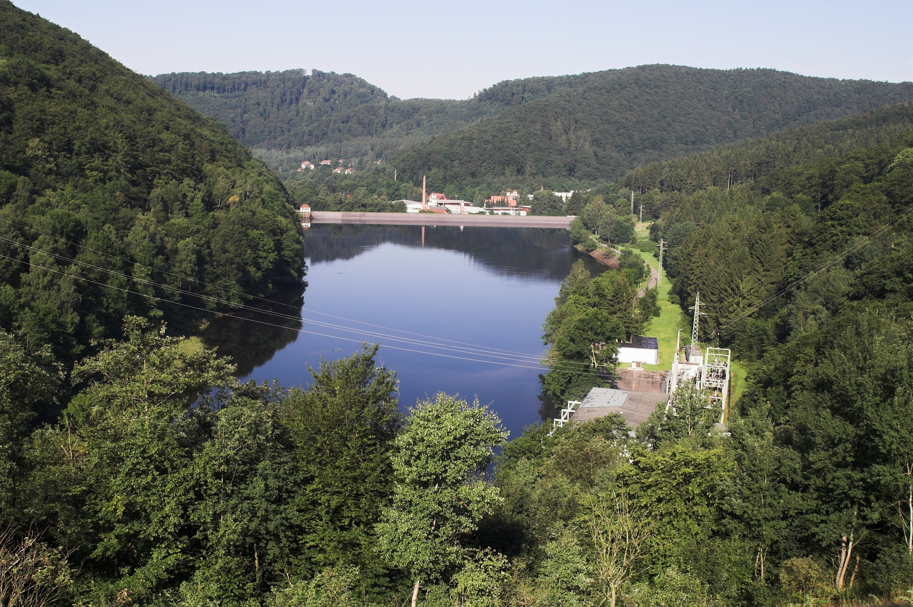 Ausgleichsbecken der Odertalsperre bei Bad Lauterberg